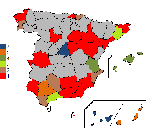 Provincias ganadoras de Miss España desde 1995, momento en que la organización prefiere que haya una candidata por provincia.